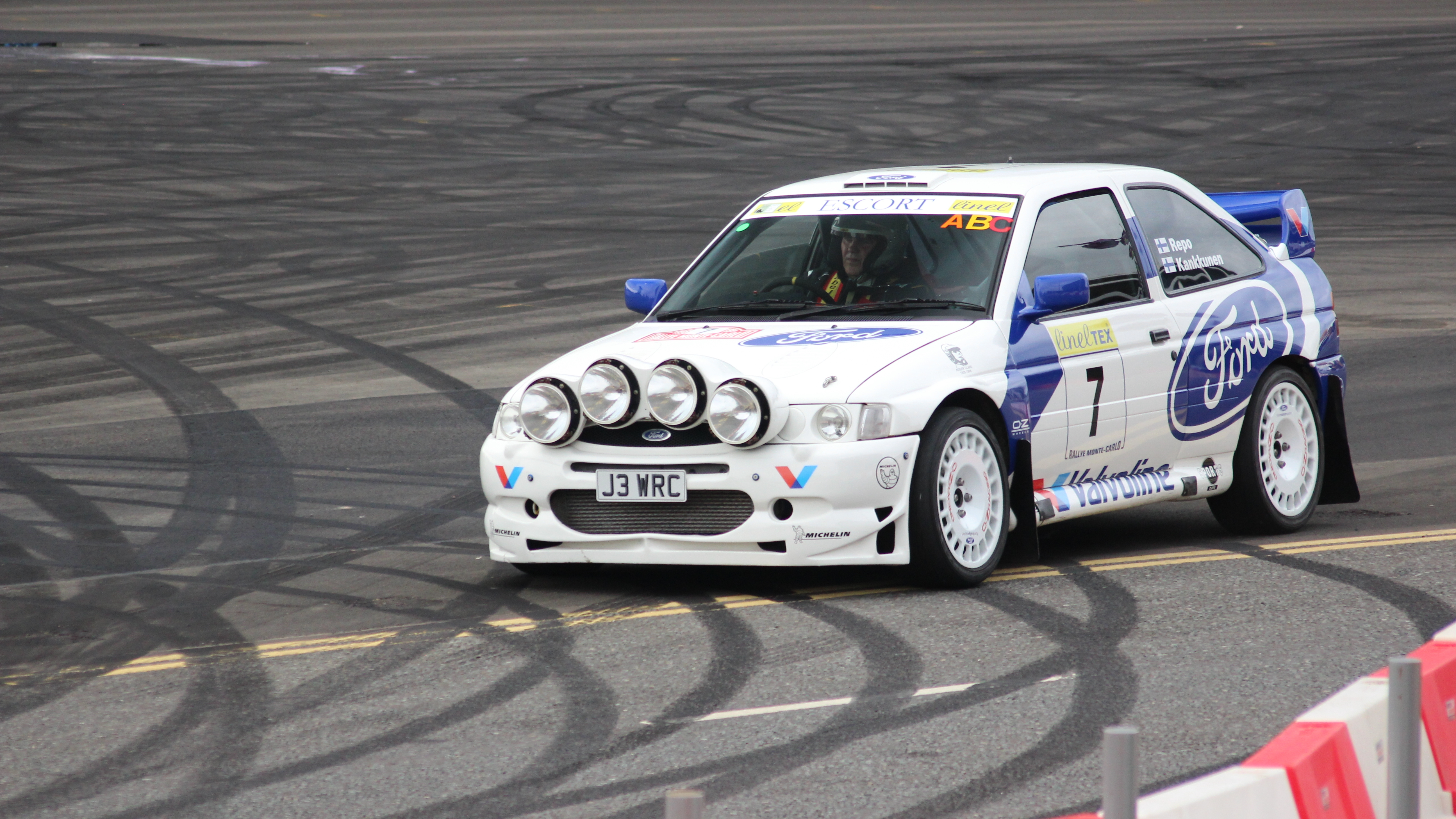 Ignition Festival Glasgow